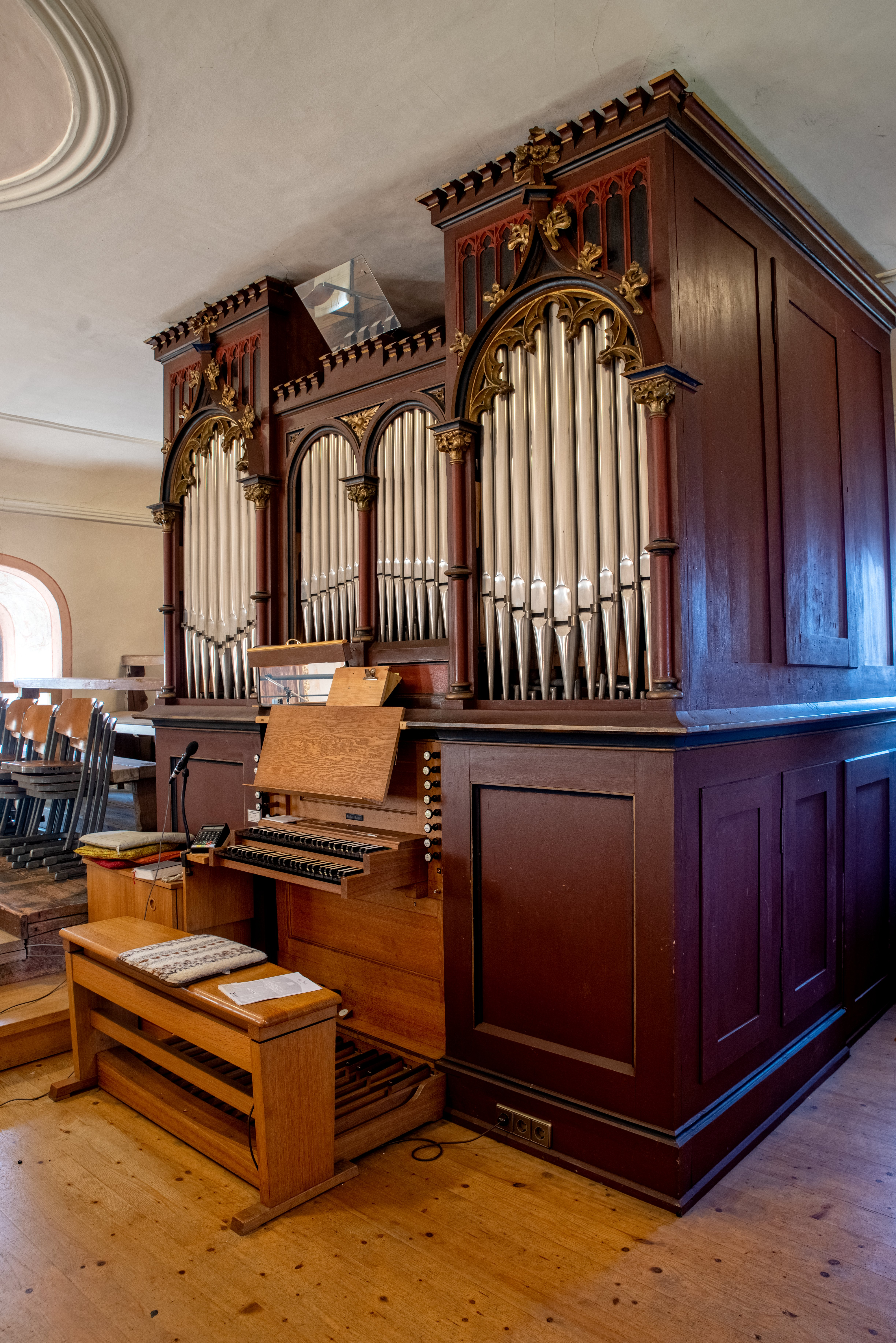 Innenaufnahmen der Kirche